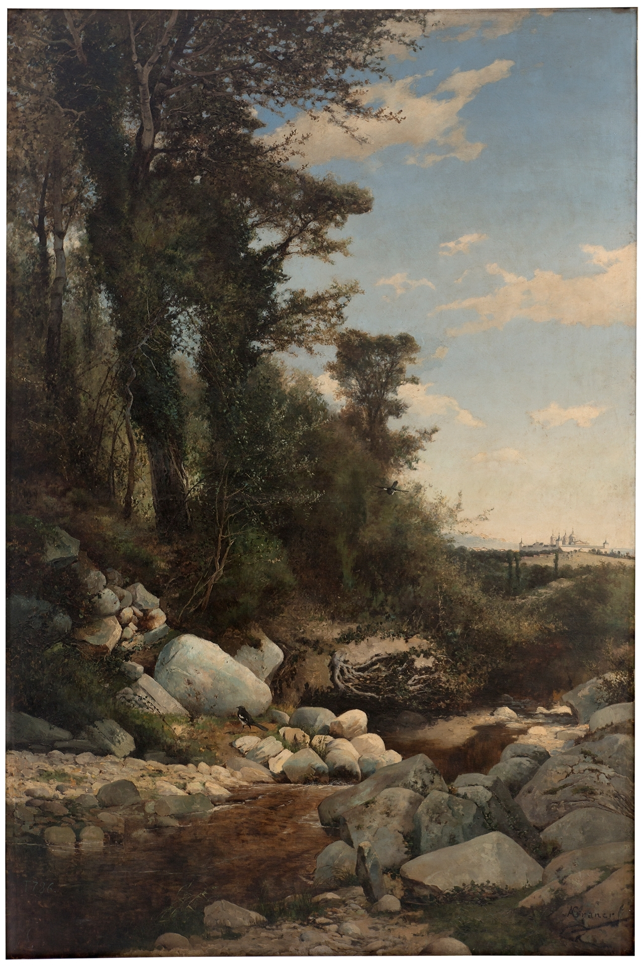 Arroyo del Batán (Escorial), de Antonio Graner y Viñuelas. Museo del Prado (Madrid, España). Óleo sobre lienzo, 300 x 200 cm. Puede verse el arroyo del Batán (como se denomina al primer tramo del río Aulencia), con el Monasterio de San Lorenzo de El Escorial (Madrid, España), al fondo a la derecha.